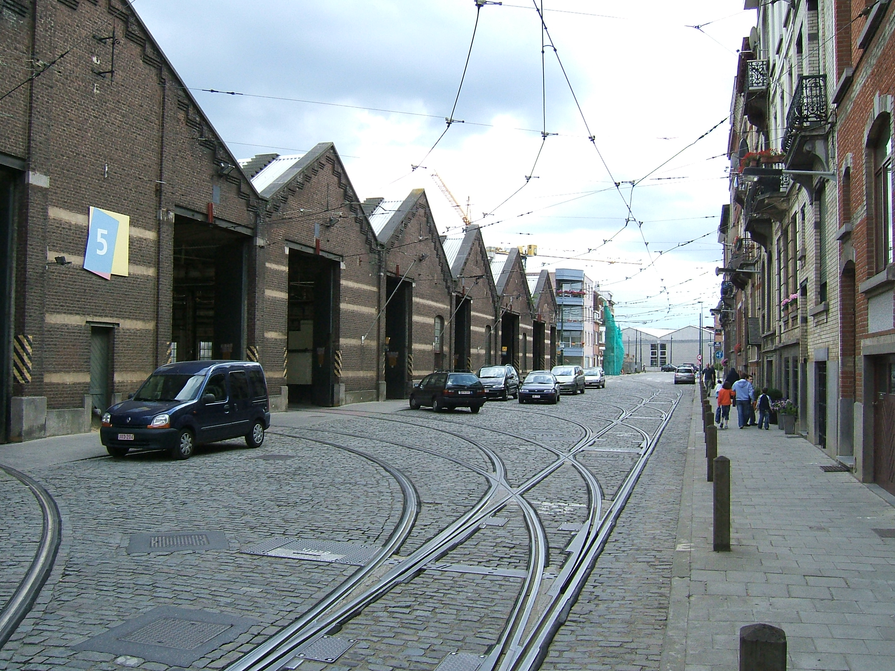 Molenbeek tram depot, Brussels, Belgium